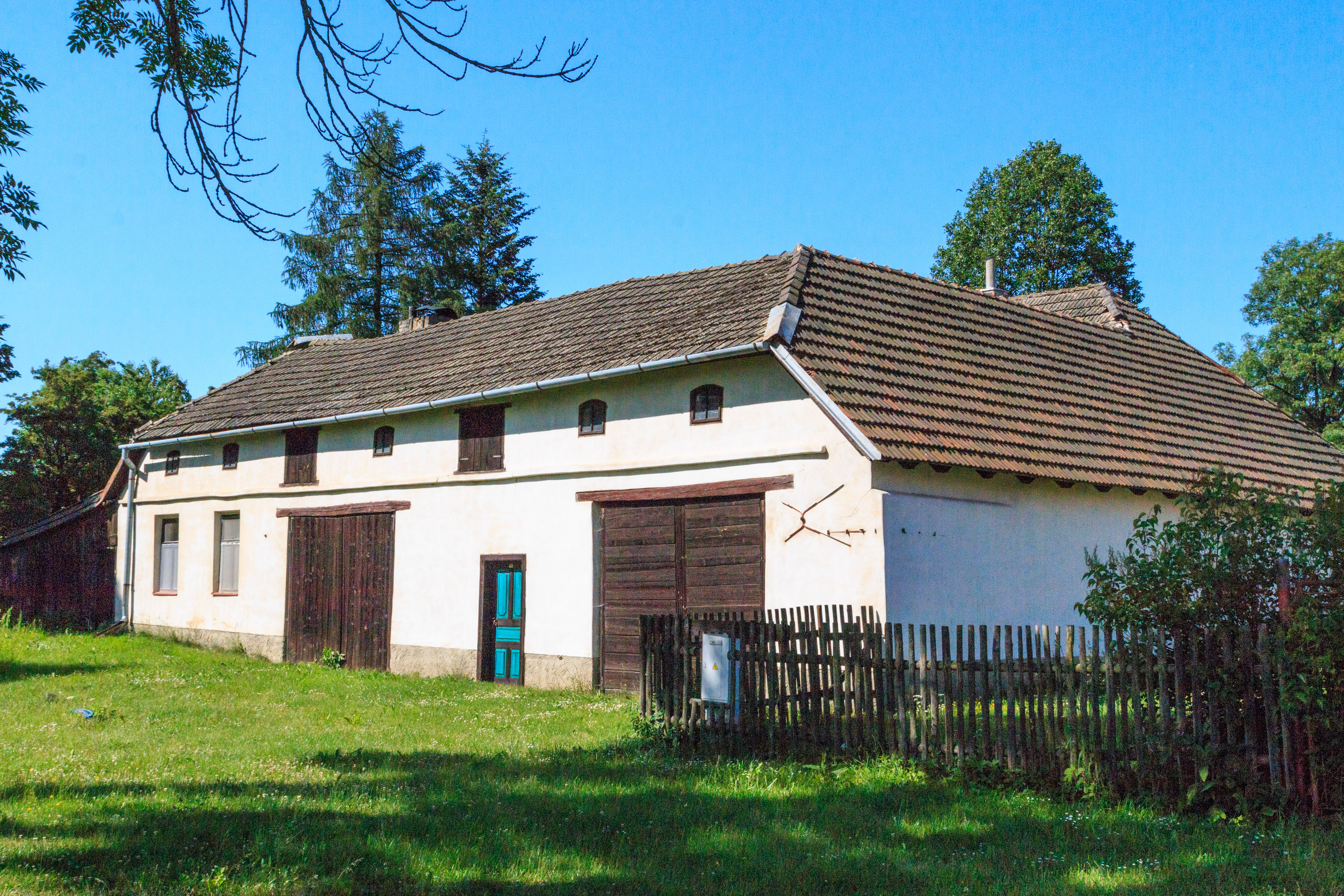 Modřec u Poličky - čp. 26 Project: Vodstvo.